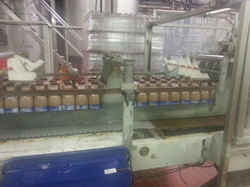 קו ייצור שוקו במחלבות יוטבתה